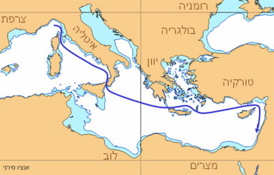 אוניית המעפילים אנצו סרני - מסלול